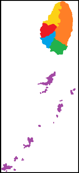 Mapa político de San Vicente y las Granadinas